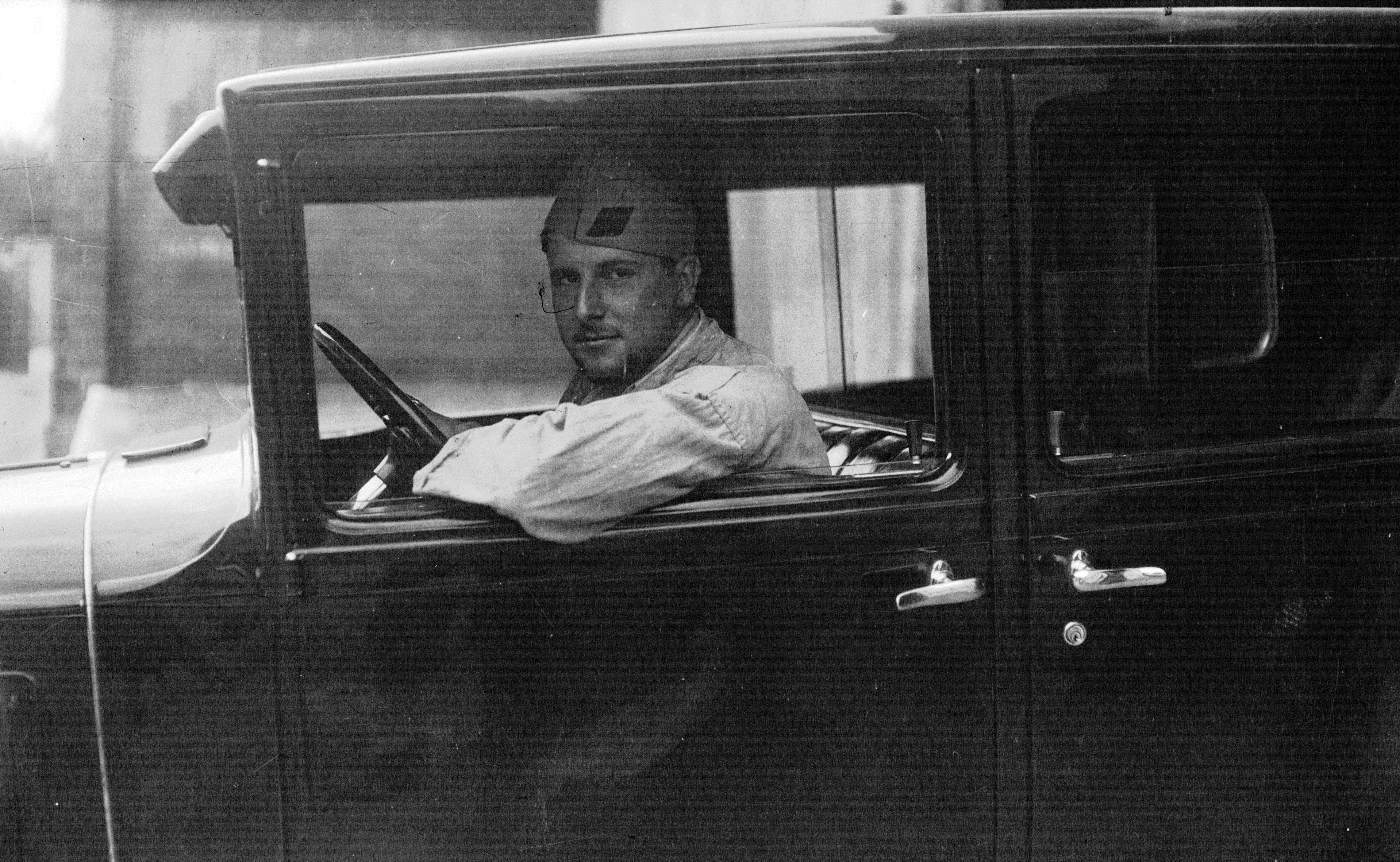 J. Lebrun, champion olympique (yatch).